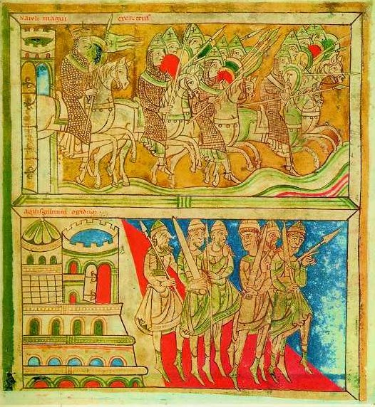 Codex Calixtinus (Liber Sancti Jacobi), f. 162v, s.n., Santiago de Compostela, Archivo de la Catedral